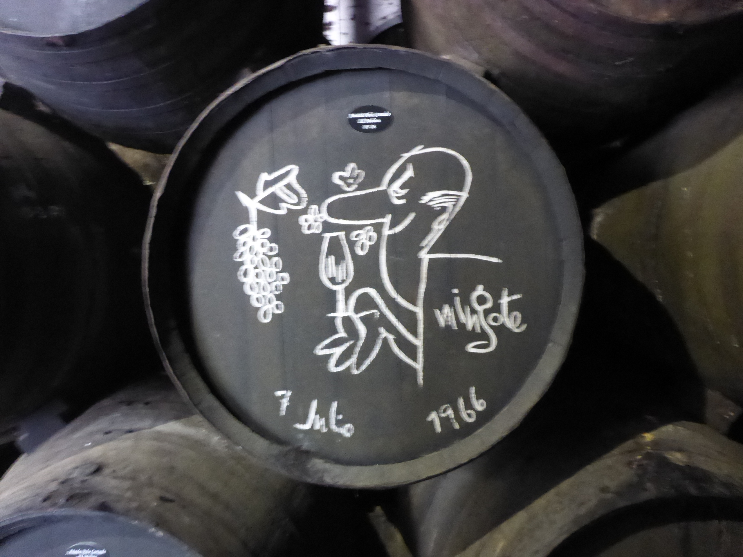 Bodegas Domecq-Fundador en Jerez de la Frontera (España)